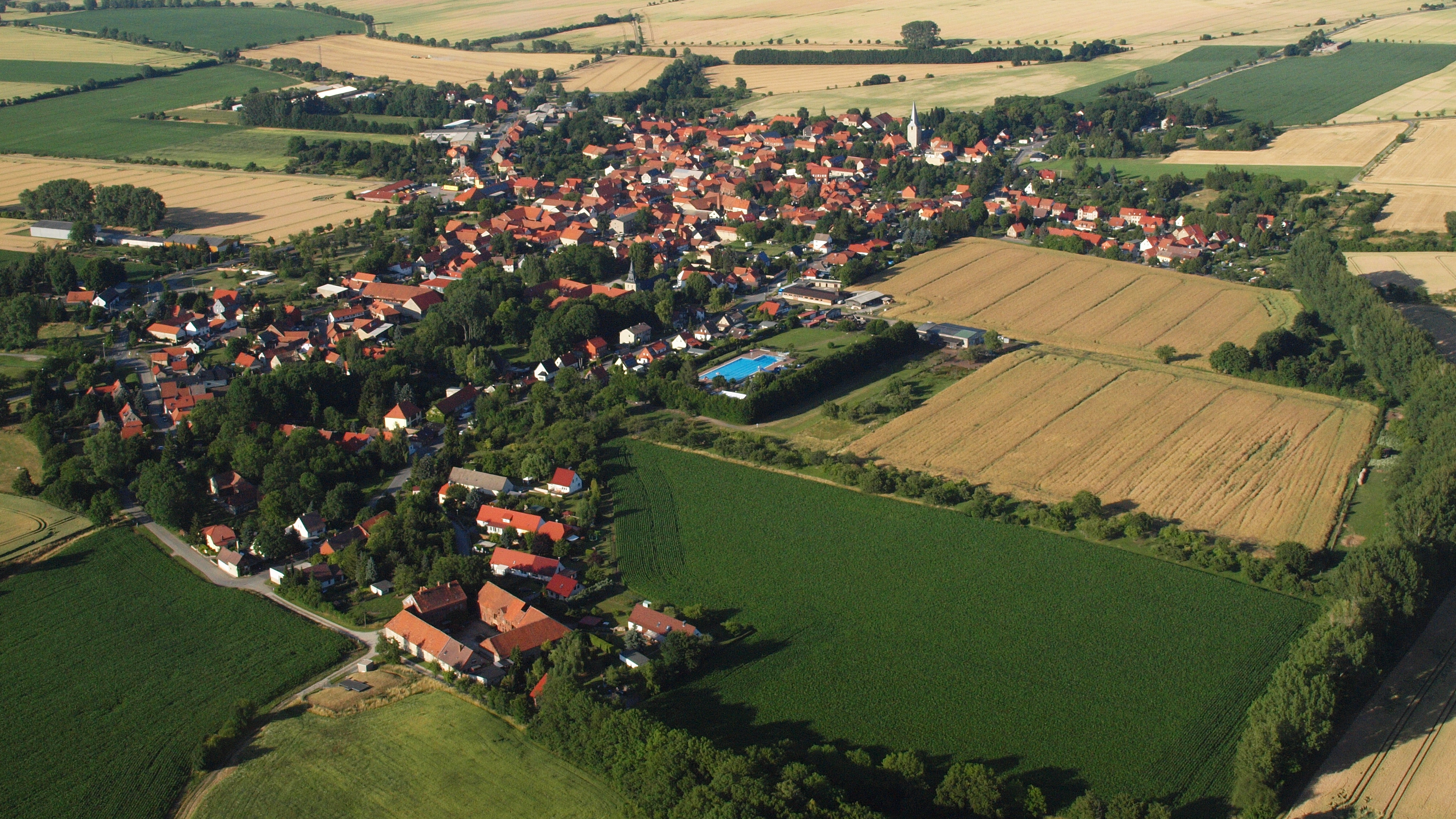 Badersleben, Luftaufnahme (2015)